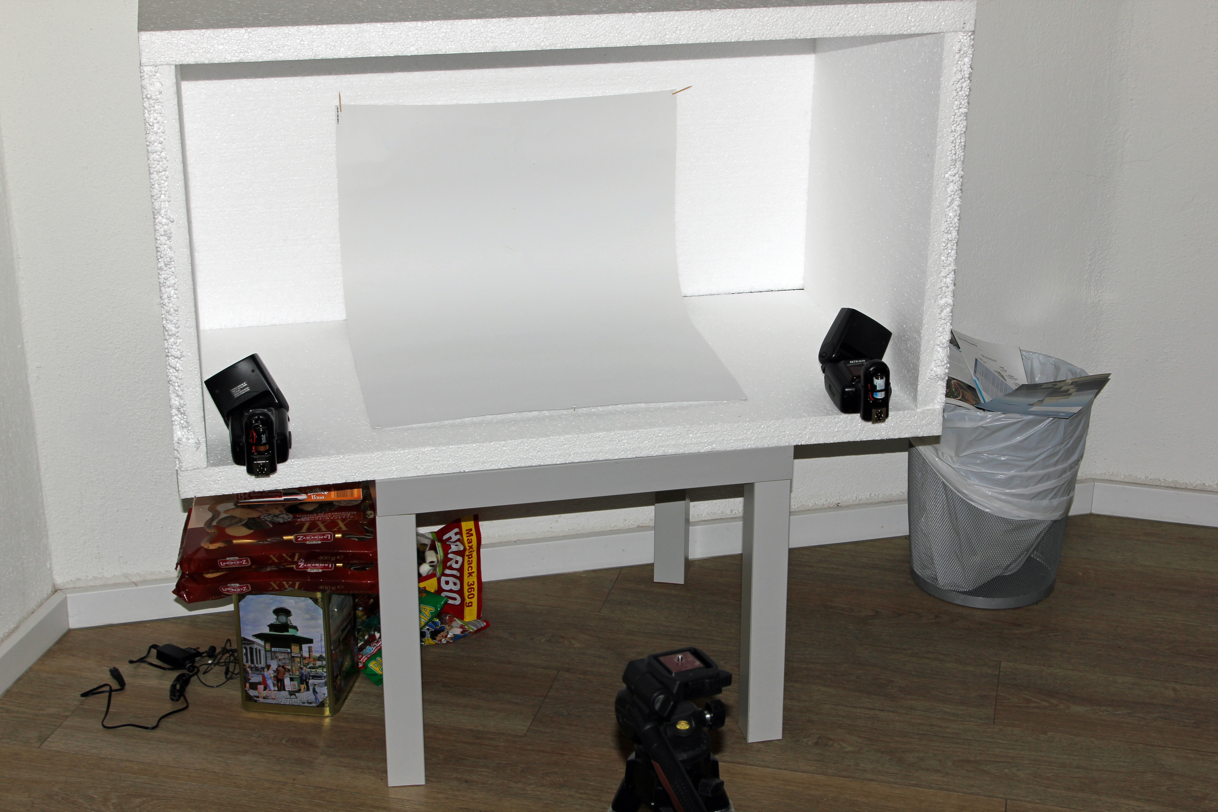 Aufbau einer Styrobox: Fertiger Aufbau mit zwei Blitzgeräten